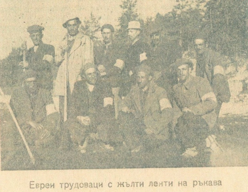 Евреи трудоваци с жълти ленти на ръкавите